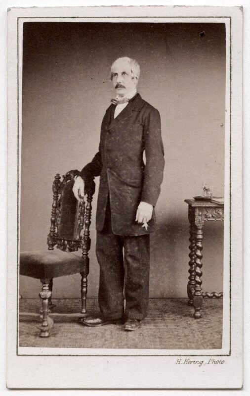 Photograph by Henry Hering